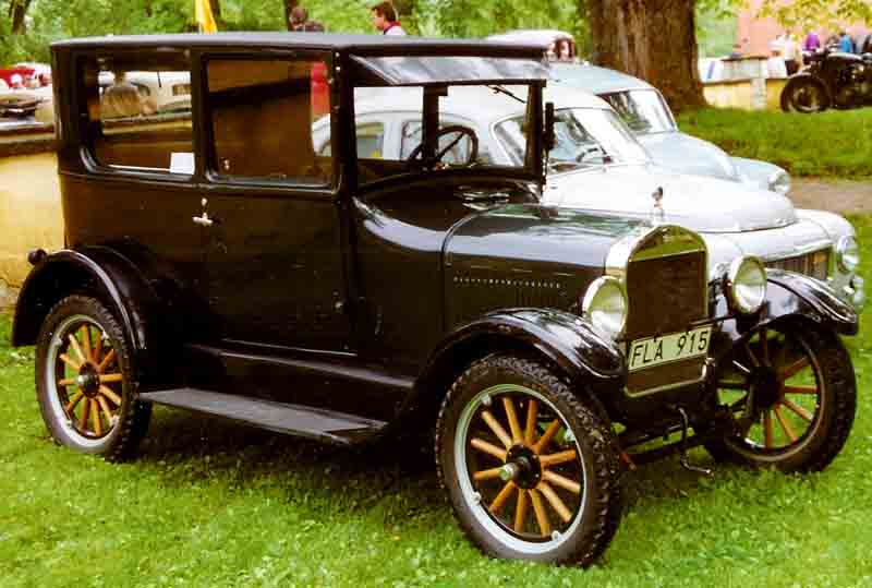 Ford Model T Tudor Sedan 1926